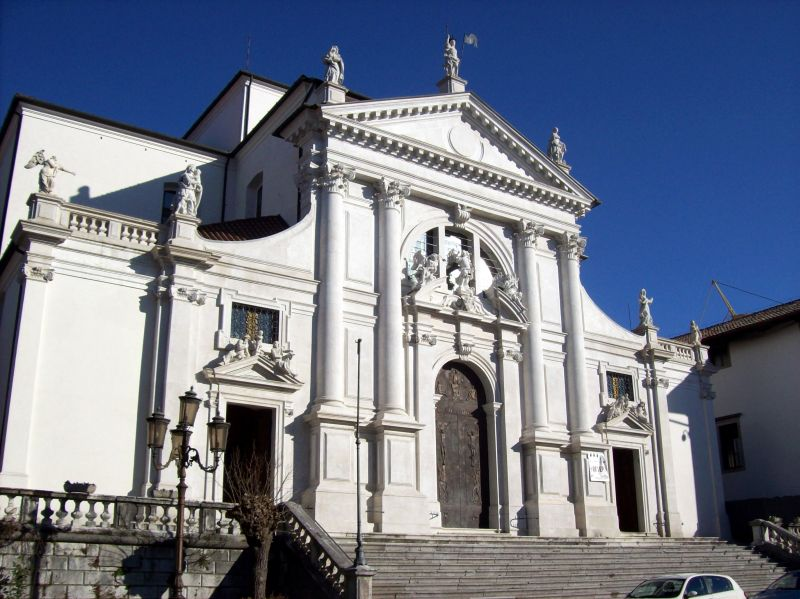 Duomo di San Daniele del Friuli